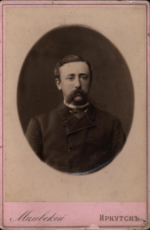 Безобразов Александр Михайлович. 6 января 1888 г. г. Иркутск. Фотограф П.Милевский.